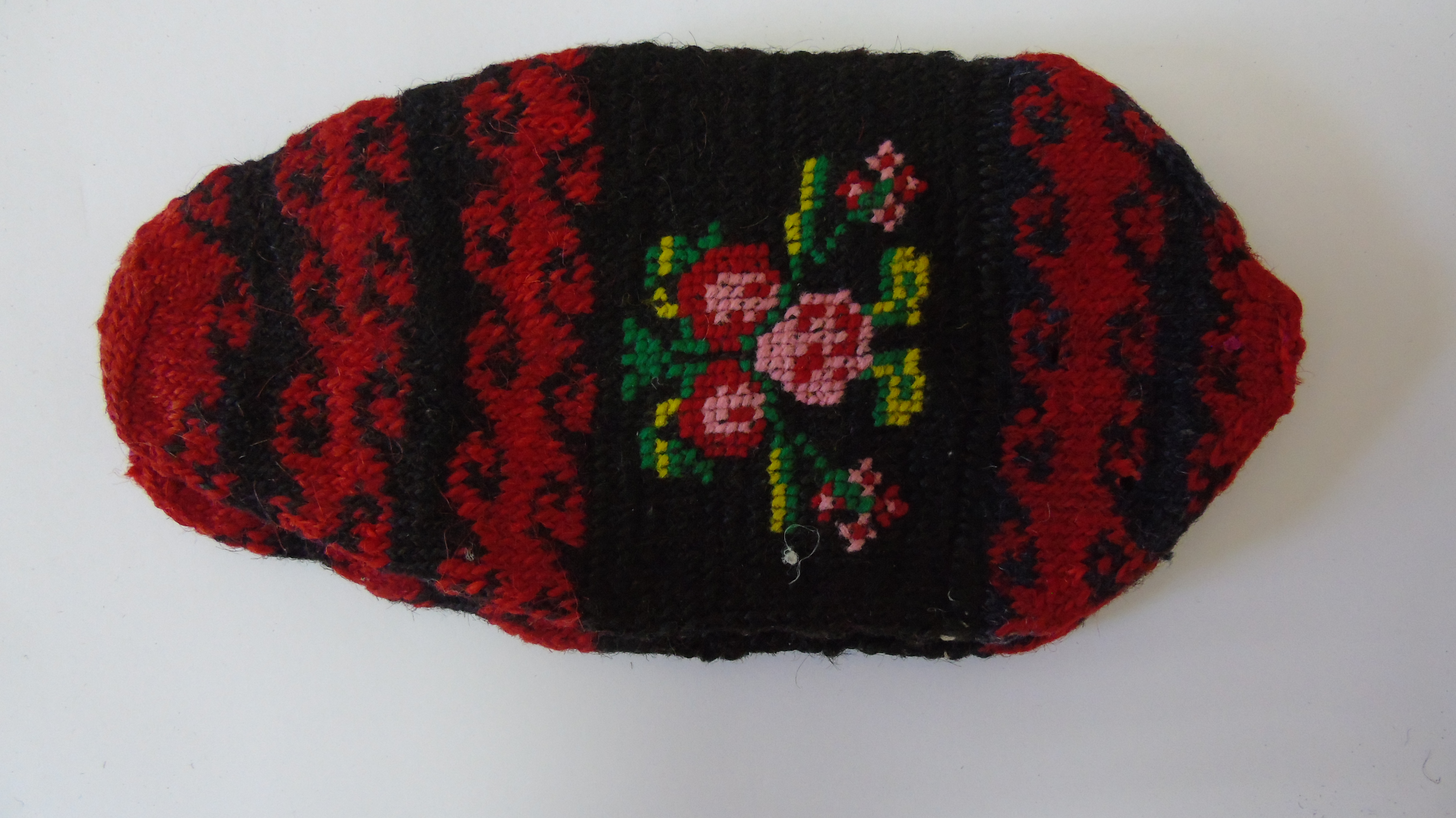 Српски (ћирилица): Наглавци црвено-црни женски са цветним мотивом на средини, који су се качили на буклију (чутуру) приликом звања за венчање као поклон, од танко предене вуне, плела Милица Велимировић из Мале Сугубине (из Збирке чарапа Музеја у Трстенику)